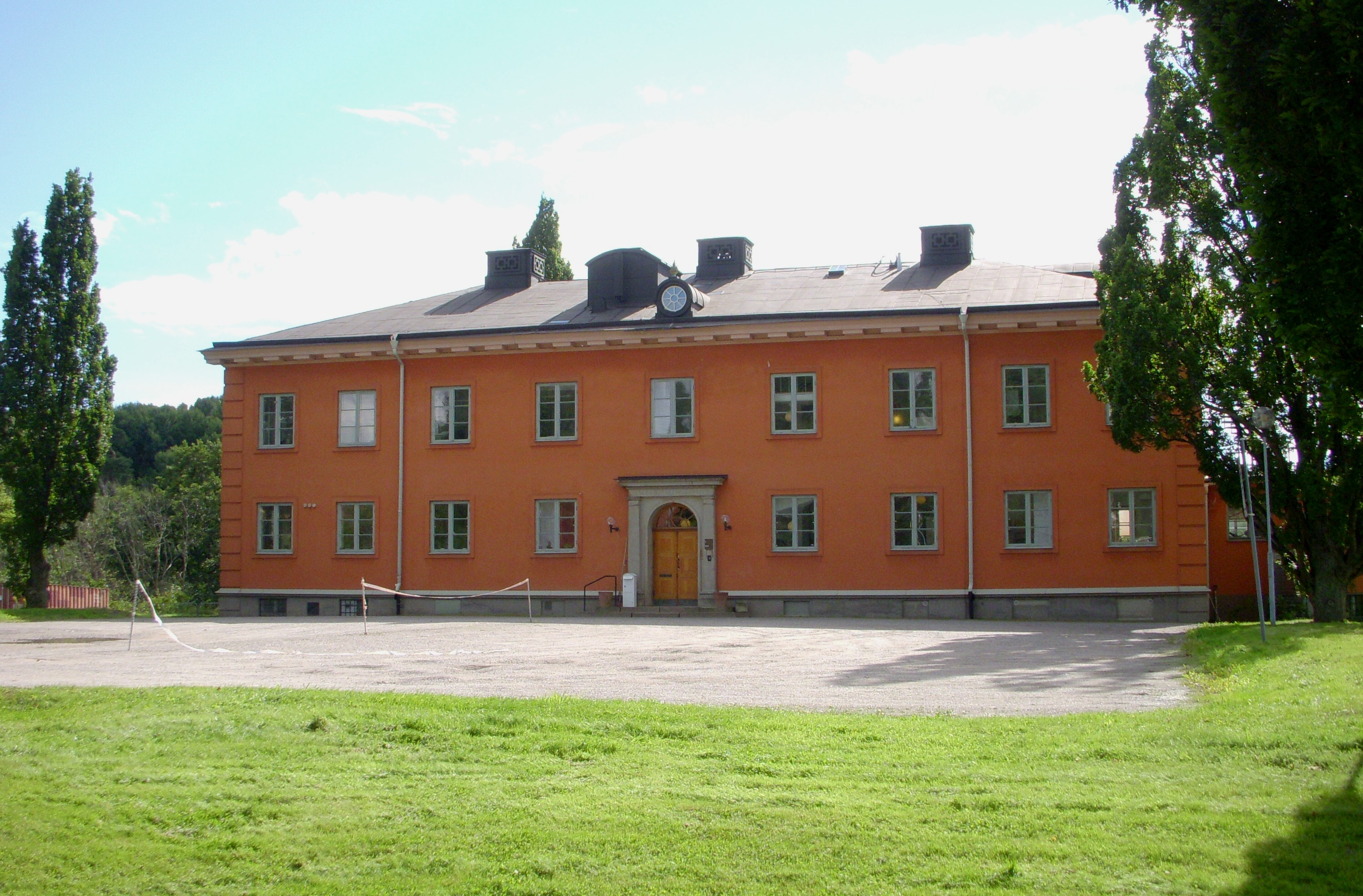 Före detta byggnaden för "Statens växtskyddsanstalt" vid Pipers väg 28 i Solna (Bergshamra) Byggnadsår 1930, ursprungligen för Institutet för Husdjursförädling. Arkitekt Sven Erik Lundqvist